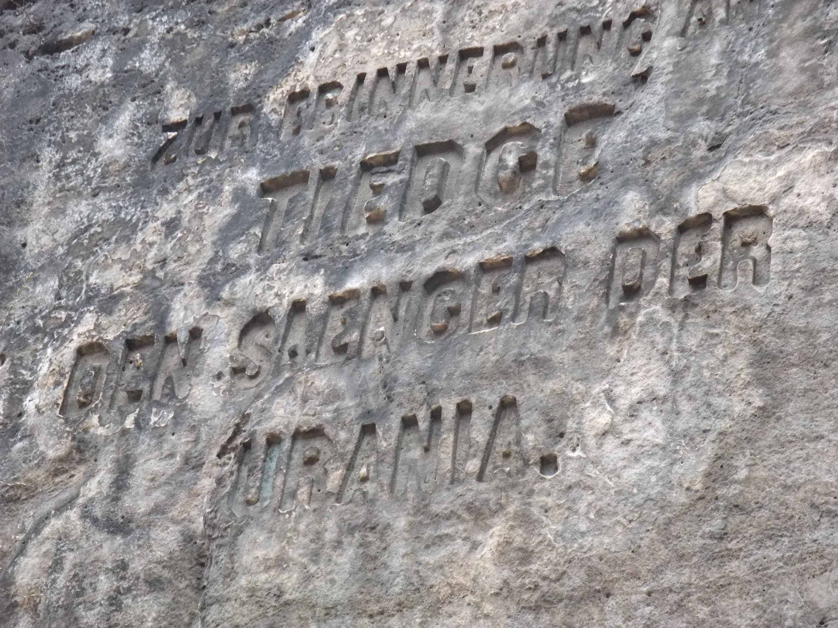 Gedenkstein mit der Inschrift "Zur Erinnerung an Tiedge den Saenger der Urania". Zu finden an der Felsenburg Neurathen im Elbsandsteingebirge in der Nähe von Dresden (Bastei, Rathen, Deutschland).